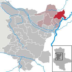 Angern in Saxony-Anhalt (Country) - District (Landkreis) Börde